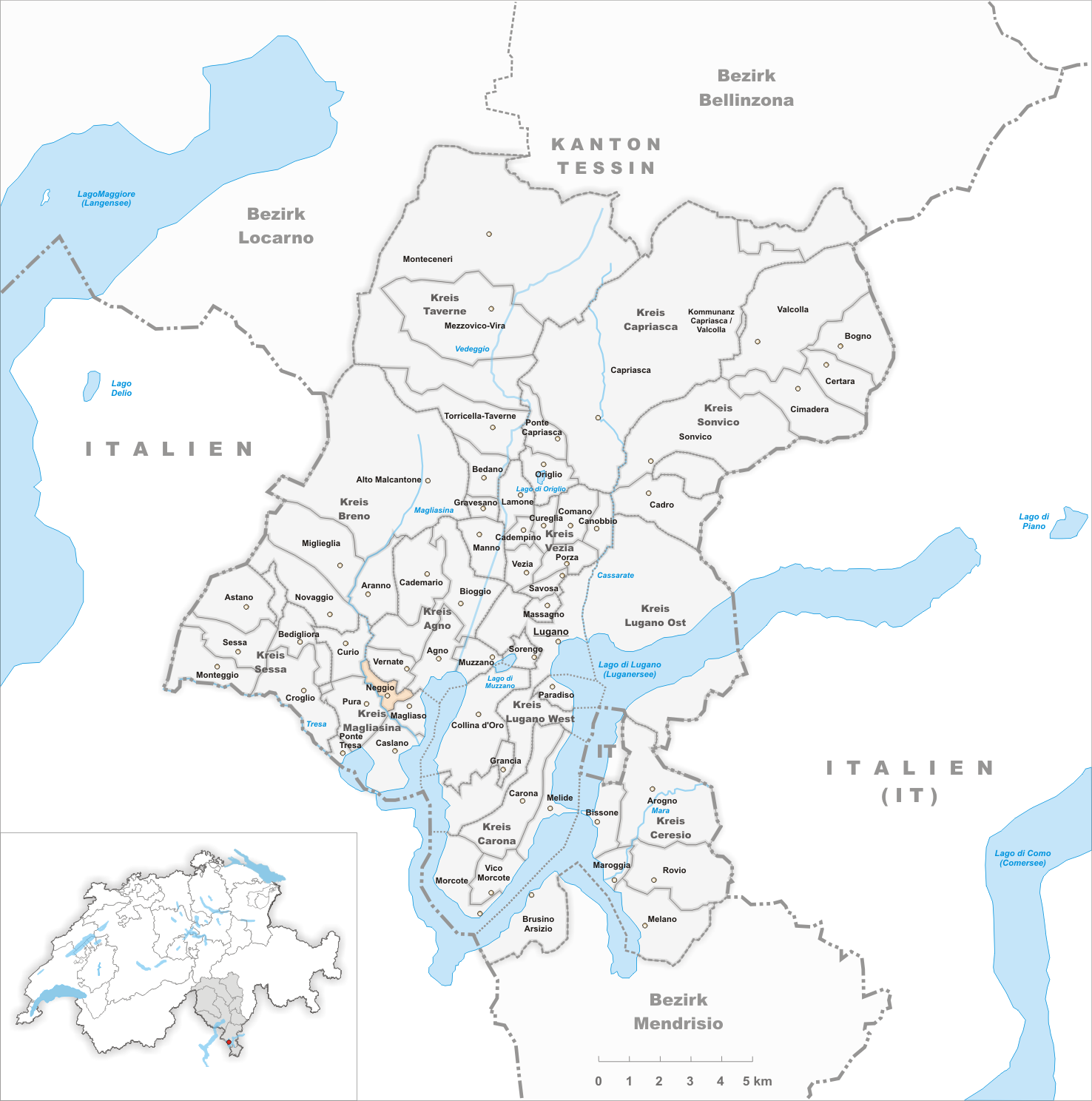 Municipality Neggio